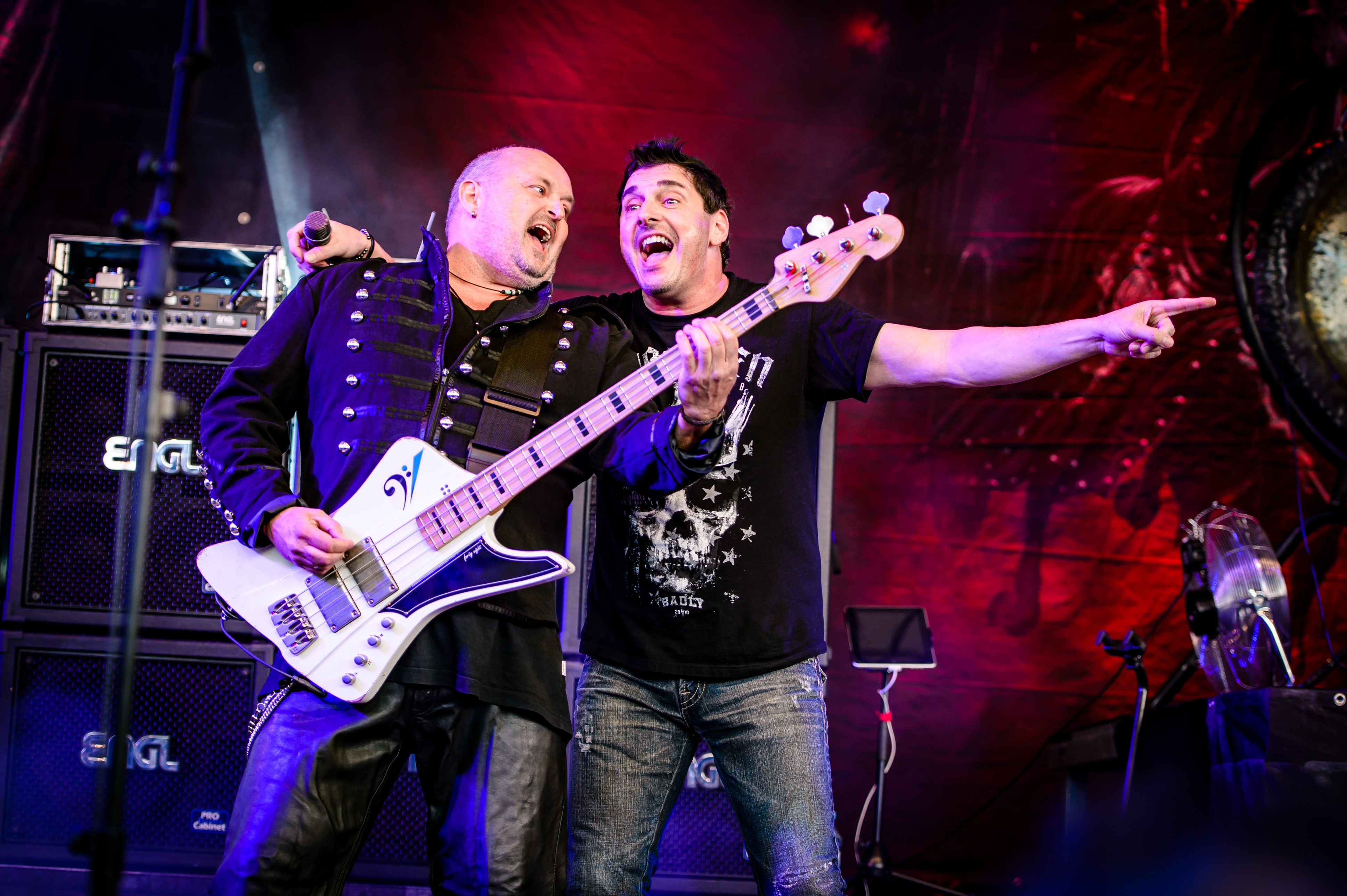 'Rock Hard Festival 2018; Amphitheater Gelsenkirchen': 'Axel Rudi Pell'